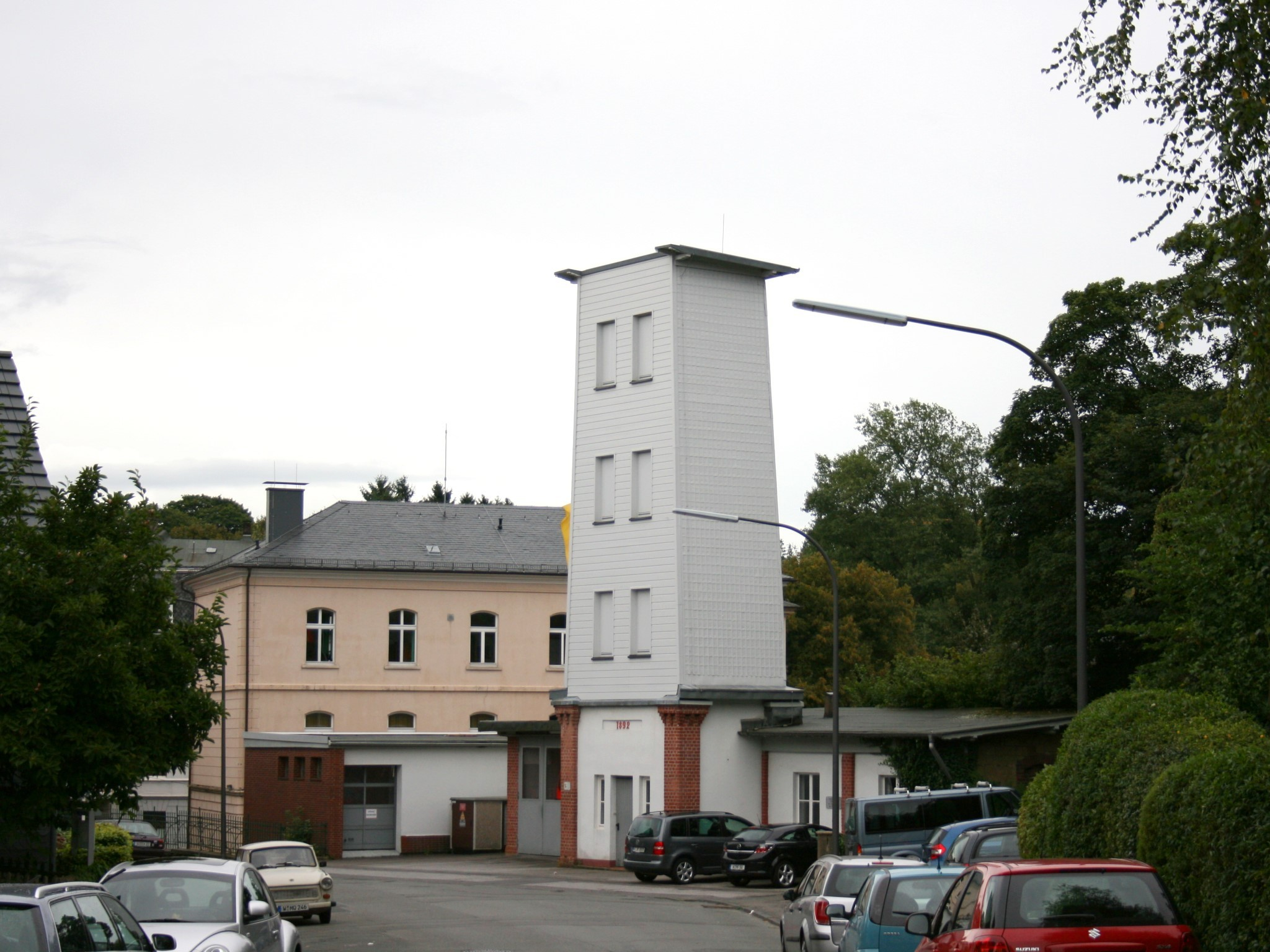 Wuppertal-Ronsdorf: Feuerwache